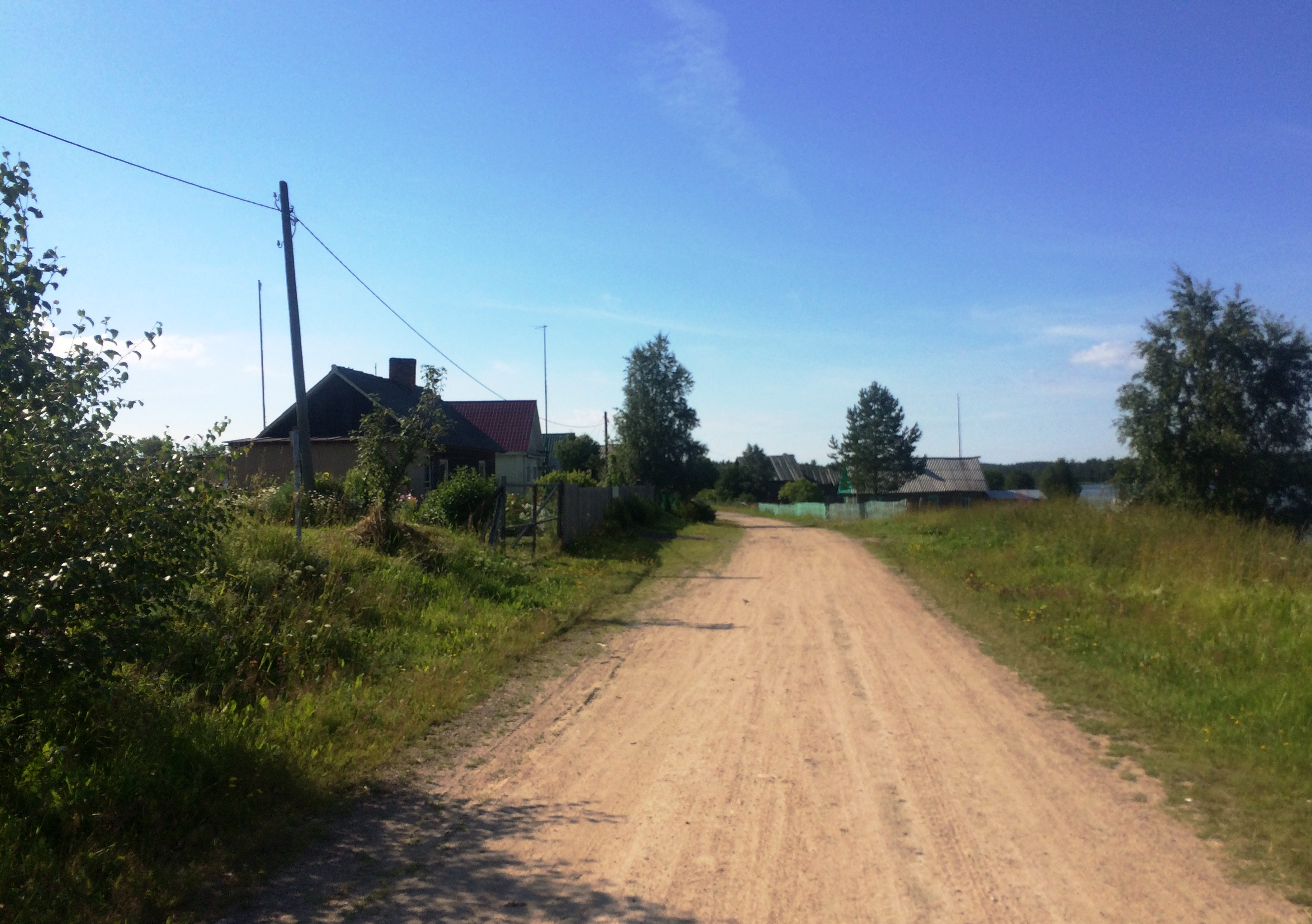 Юстозеро (деревня)